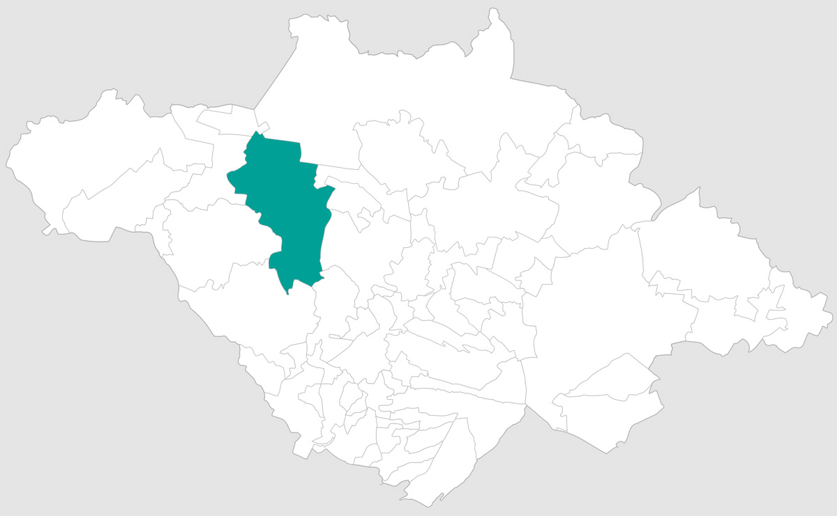 Mapa del municipio de Hueyotlipan